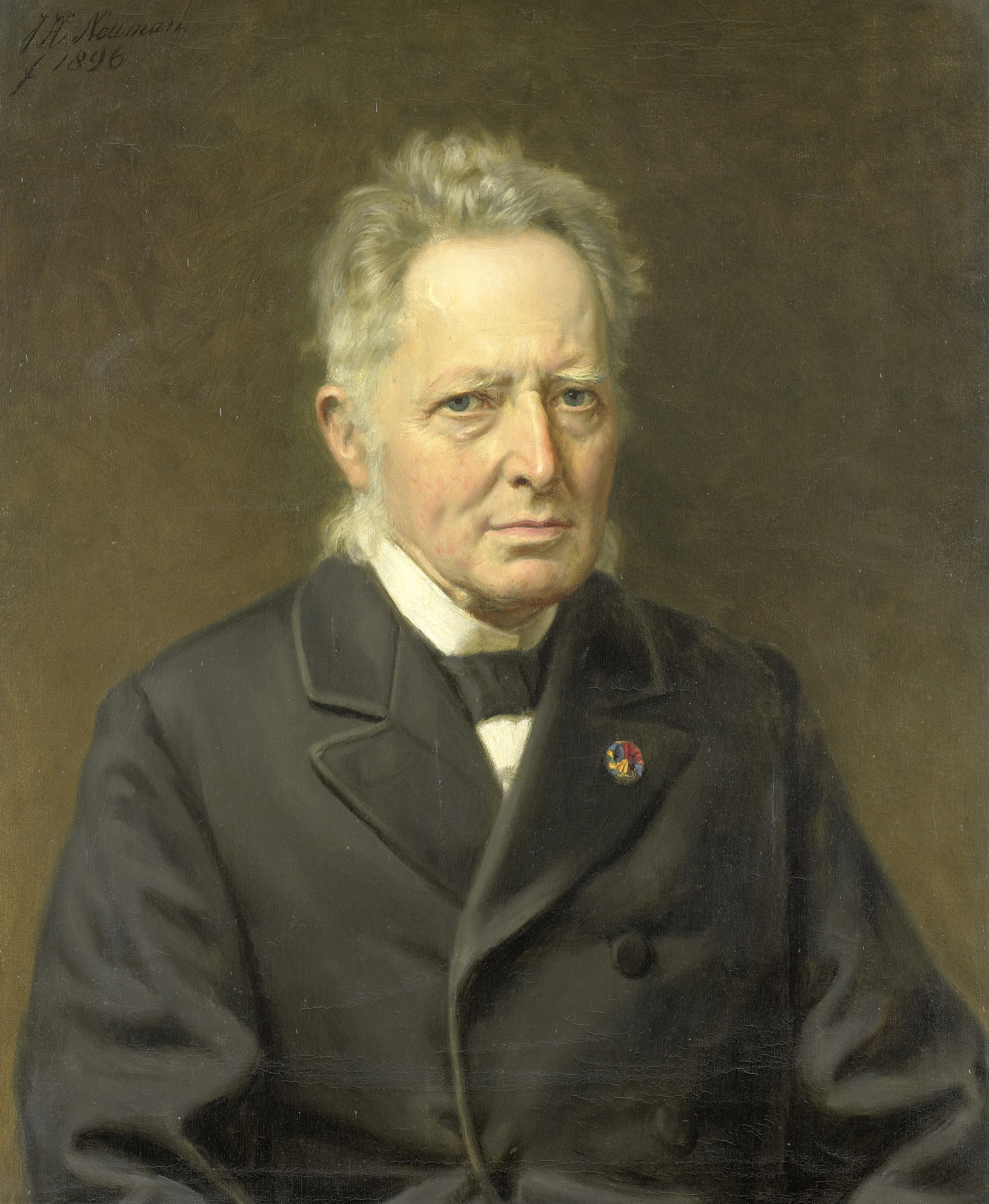 Portret van Jan Heemskerk Azn (1818-97). Minister van Binnenlandse Zaken. Verrichtte op 13 juli 1885 de opening van het Rijksmuseum. Zittend ten halven lijve naar rechts. Geschilderd naar een foto van H.W. Wollrabe.